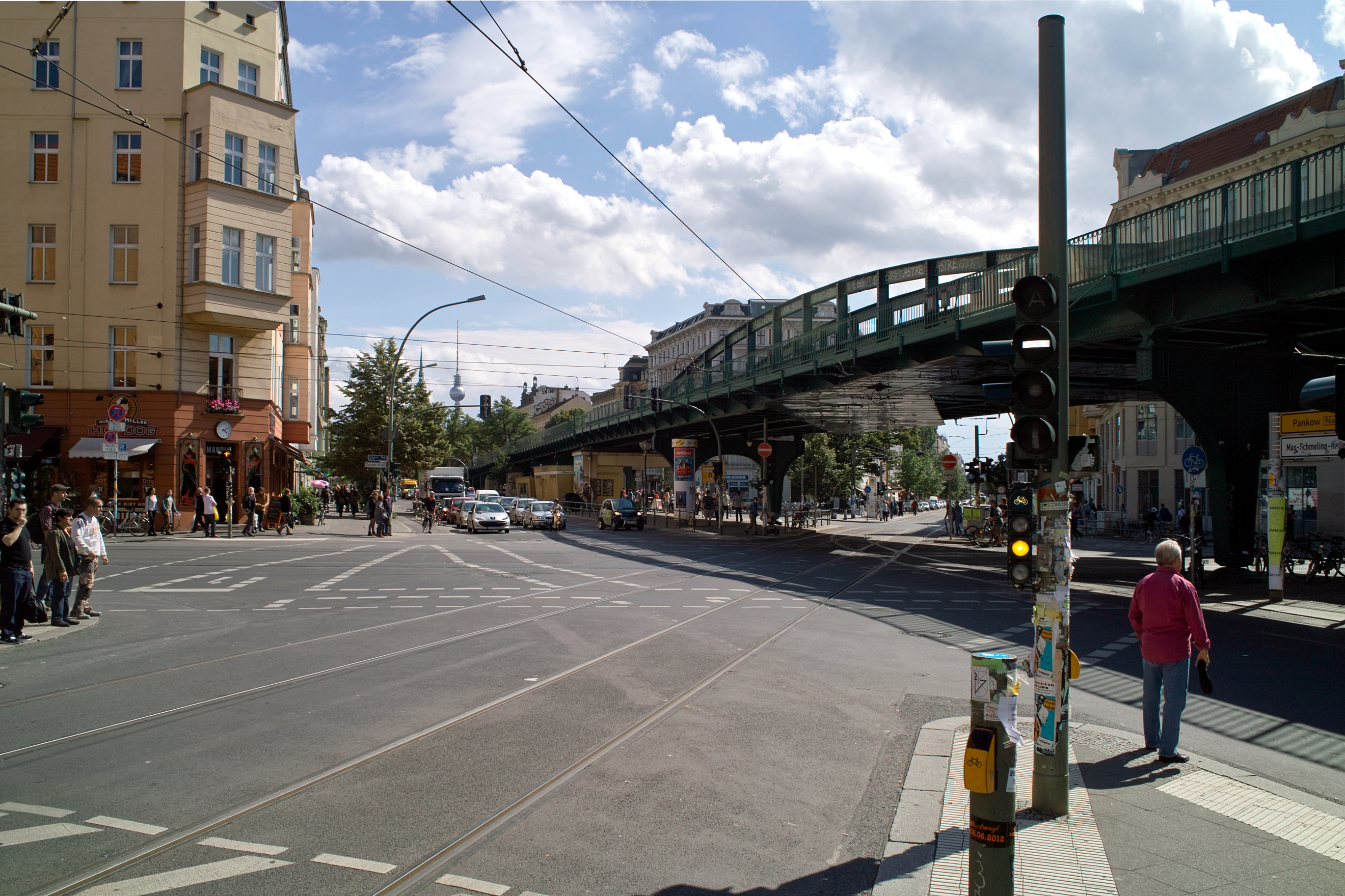 Schönhauser Allee Ecke Pappelallee